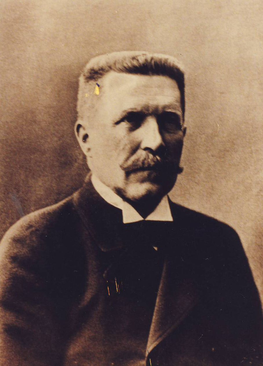 Porträt von Victor Carl Gustaf von Taube, estländischer Gutsbesitzer, Unternehmer sowie Friedensrichter